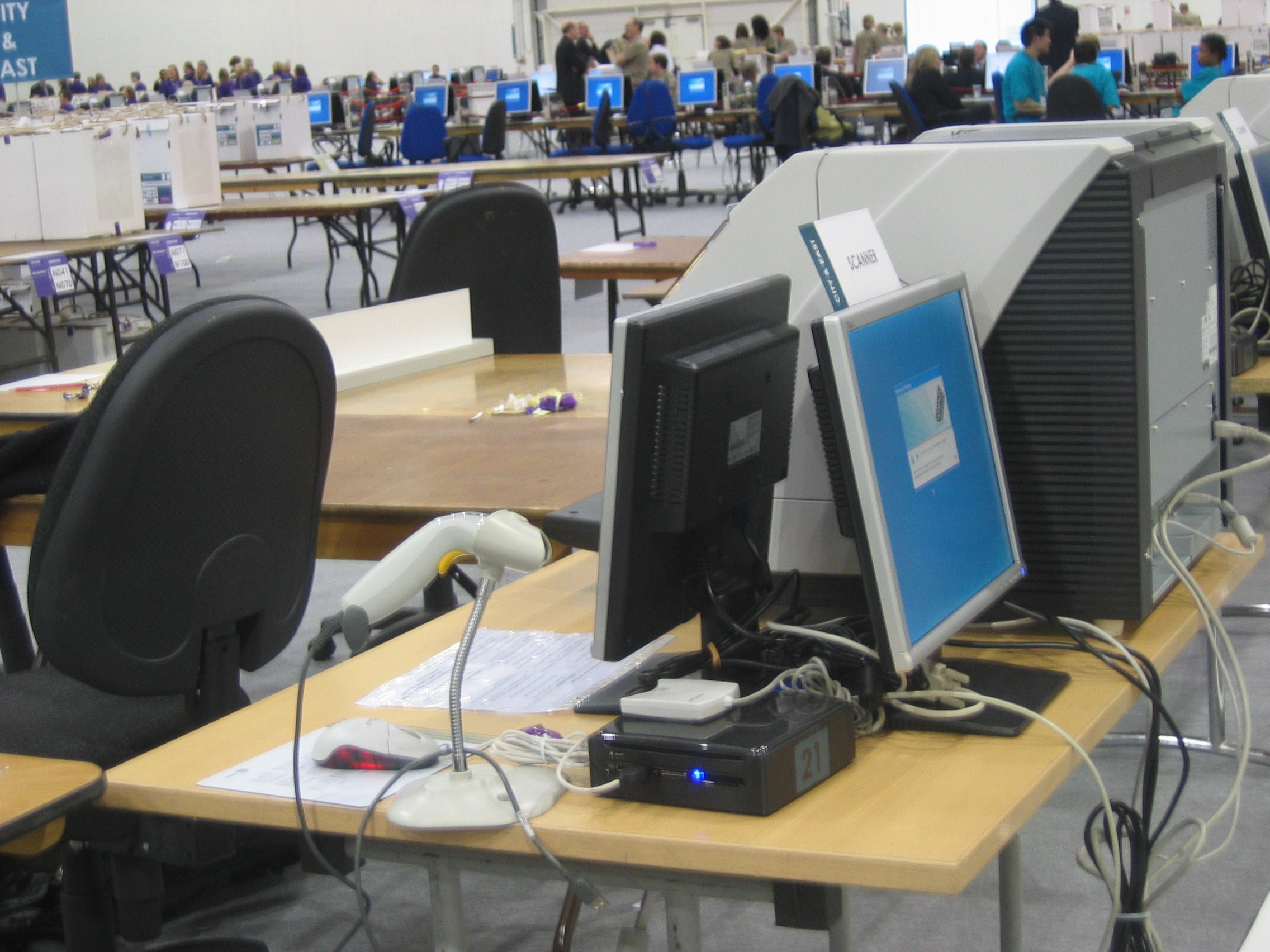 London Elections 2008, Excel count centre. Ballot box bar code scanner.